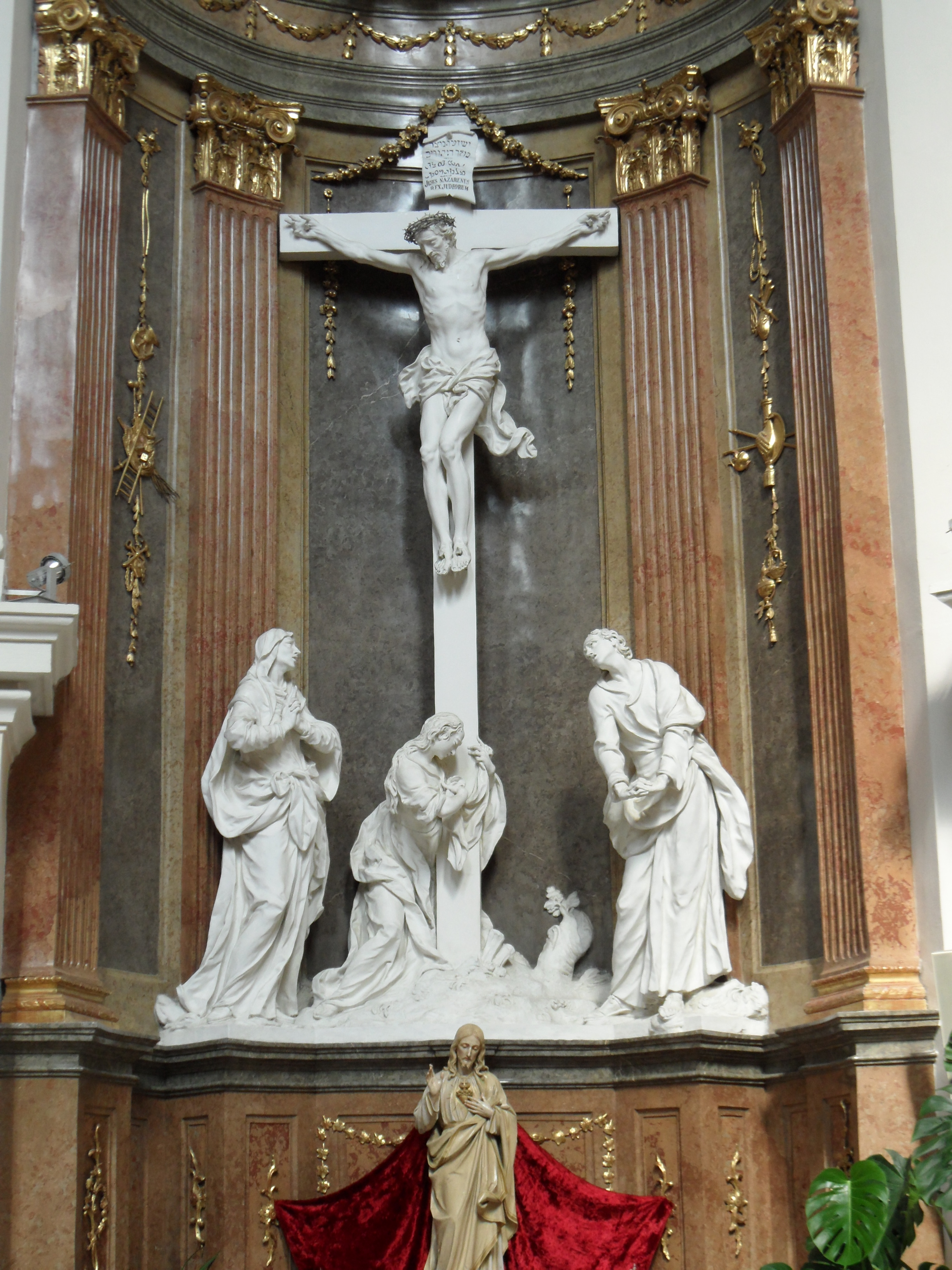 Brno - katedrála sv. Petra a Pavla, oltář sv. Kříže (1777) - Ondřej Schweigl